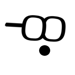 Esquisse ultra-minimaliste du personnage Dogbert dans Dilbert de Scott Adams.